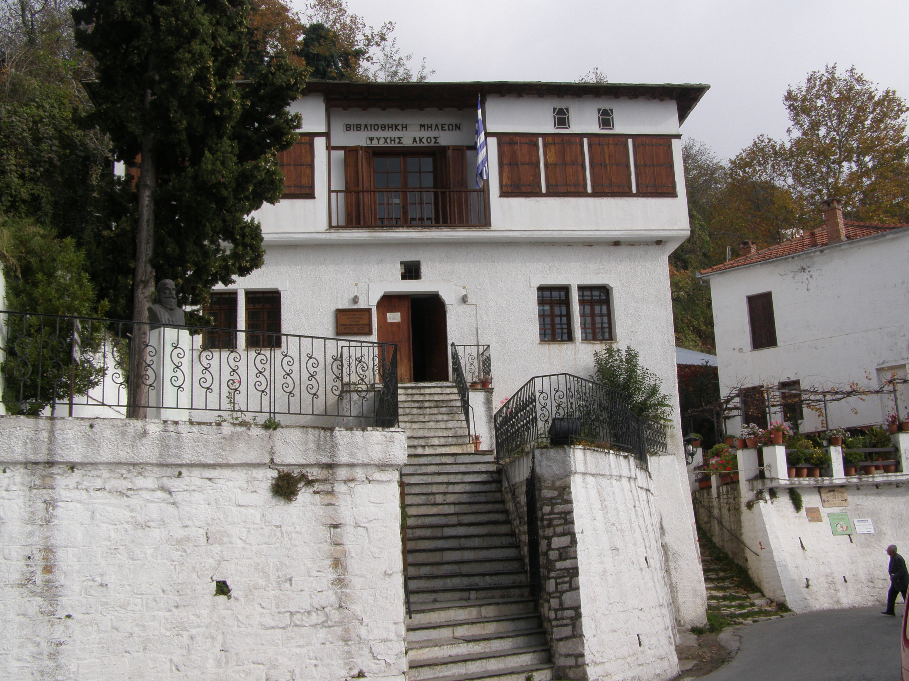 Η Βιβλιοθήκη Μηλεών.